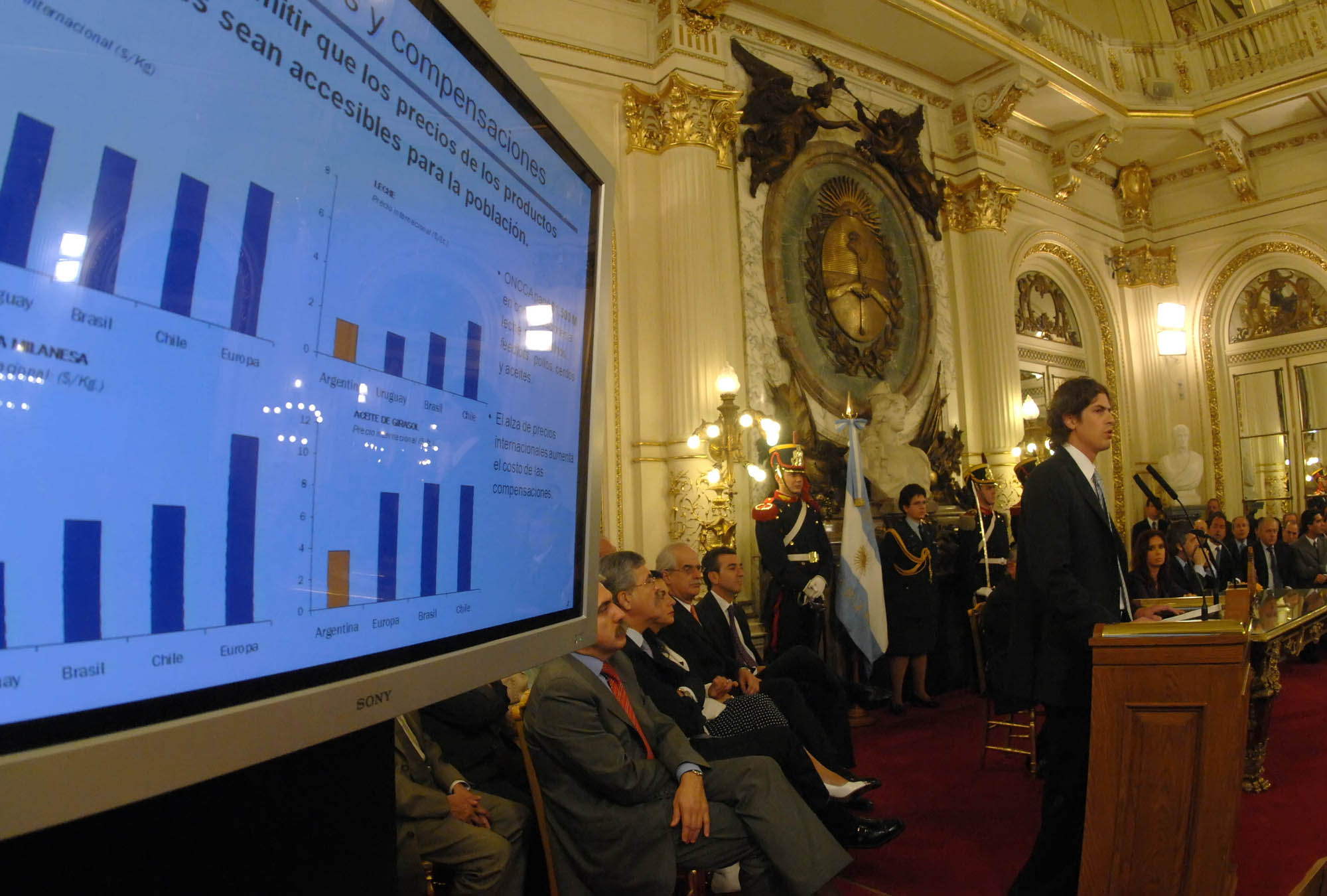 Martín Lousteau como Ministro de Economía de la República Argentina, anunciando una serie de medidas dirigidas al sector agropecuario en un acto el Salón Blanco de la Casa Rosada.